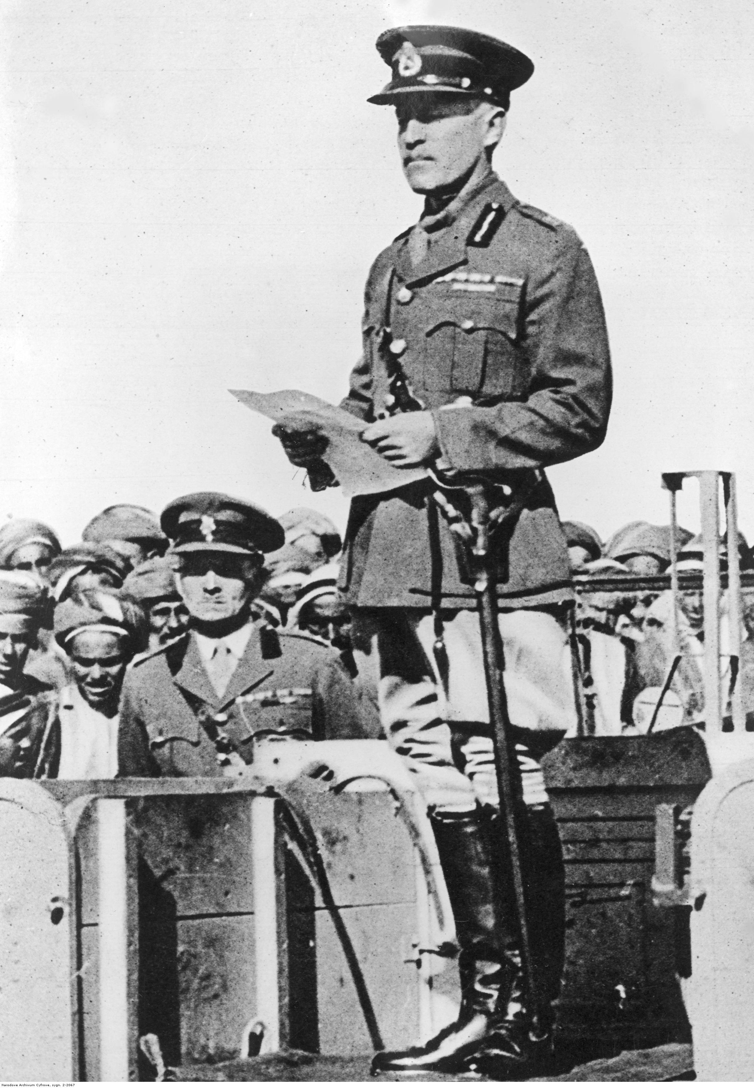 Brytyjski generał Sir Richard O' Connor w niewoli niemieckiej; Afryka Północna.